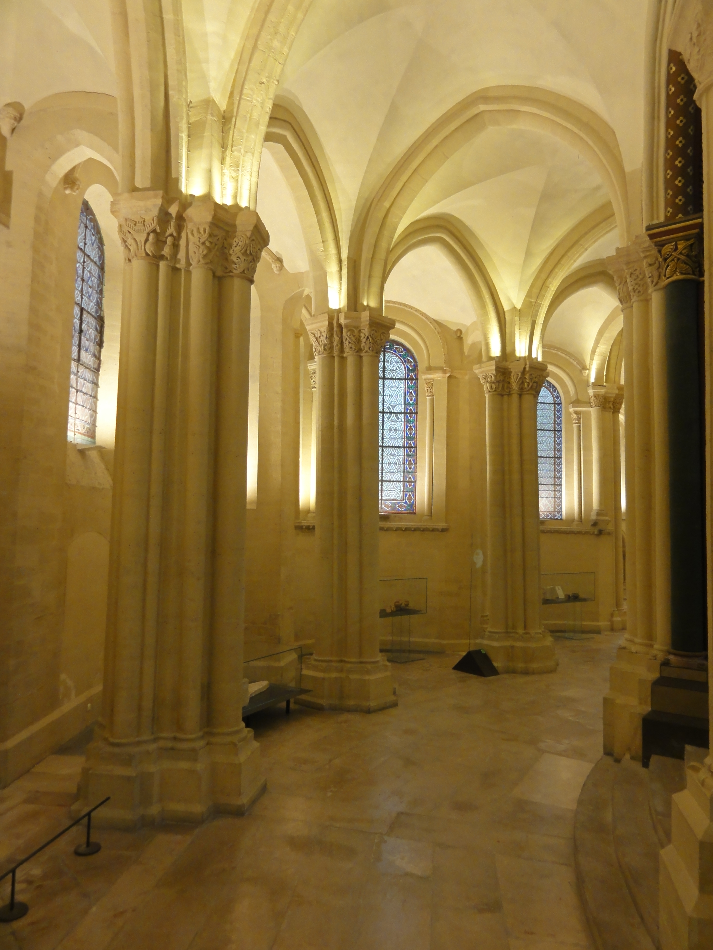 Déambulatoire nord, vue vers le sud-est.